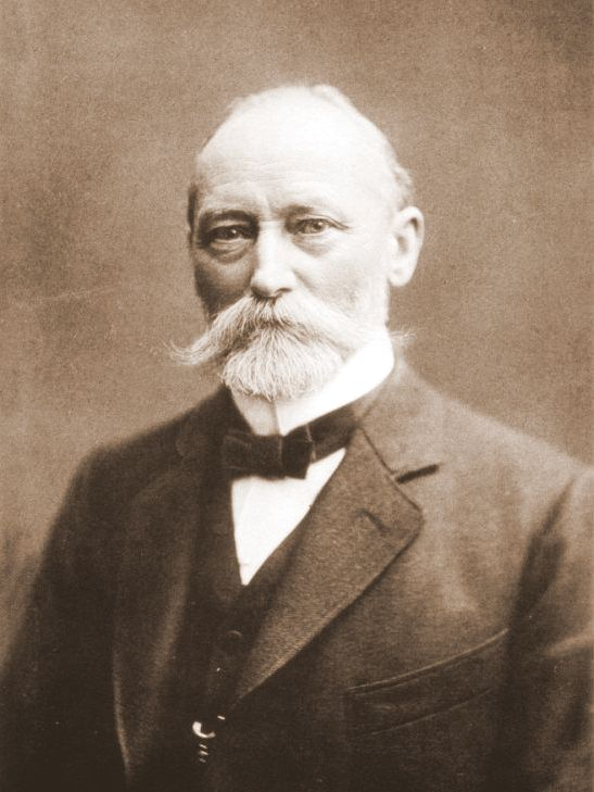 Julius Erbslöh II., Fabrikant, Mäzen in Barmen, Landtagsabgeordneter, 1842-1929